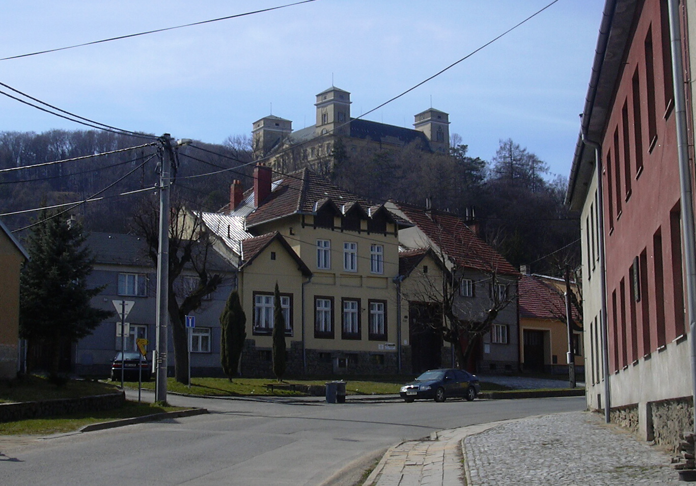 zámek Račice (Vyškov District, Czech Republic)